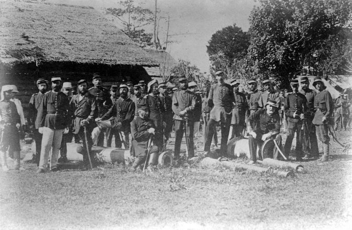 Repronegatief. De algemene staf in de kraton van de Sultan, met op het grootste kanon Generaal van Swieten